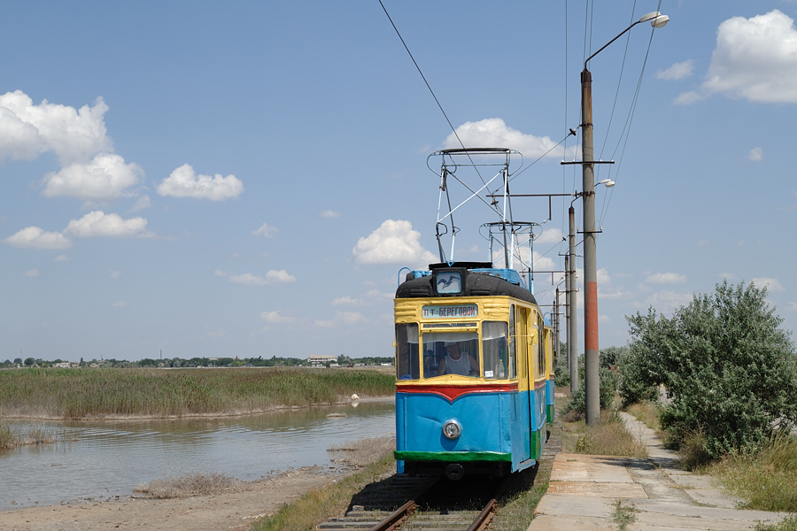 Straßenbahn Molotschne (Pljasch)